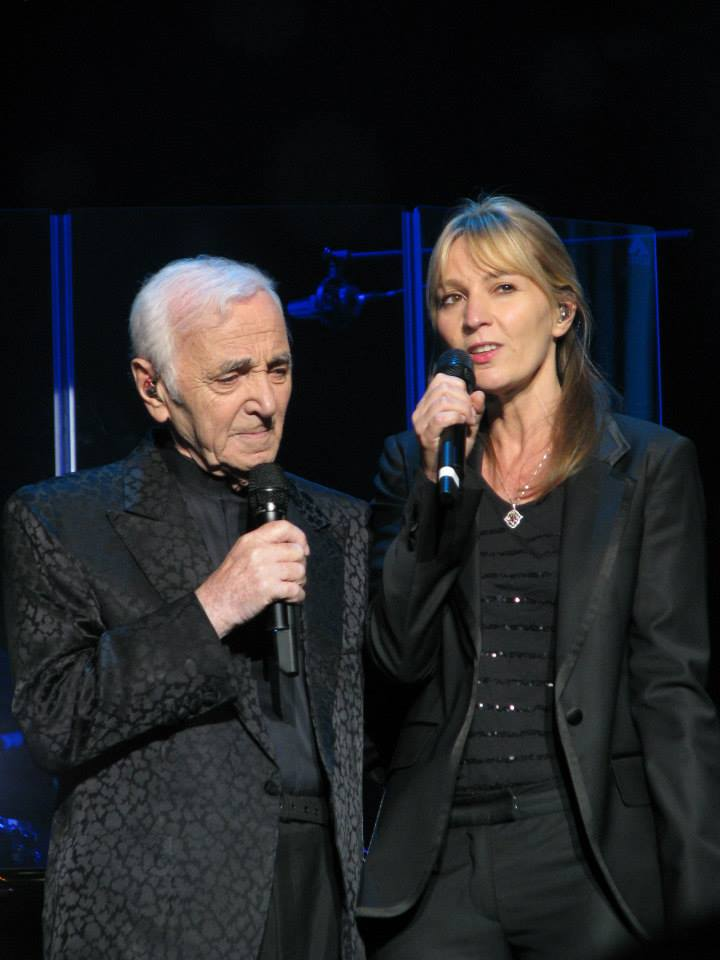 Charles Aznavour (b. May 22, 1924) – French singer, and Katia Aznavour